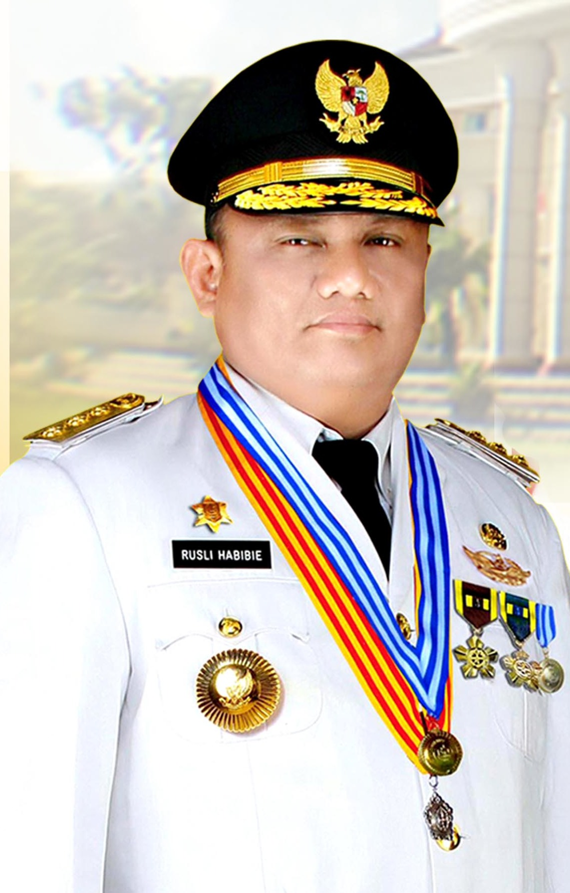 Foto Gubernur Rusli Habibie Laporan Kinerja Pemprov Gorontalo 2014